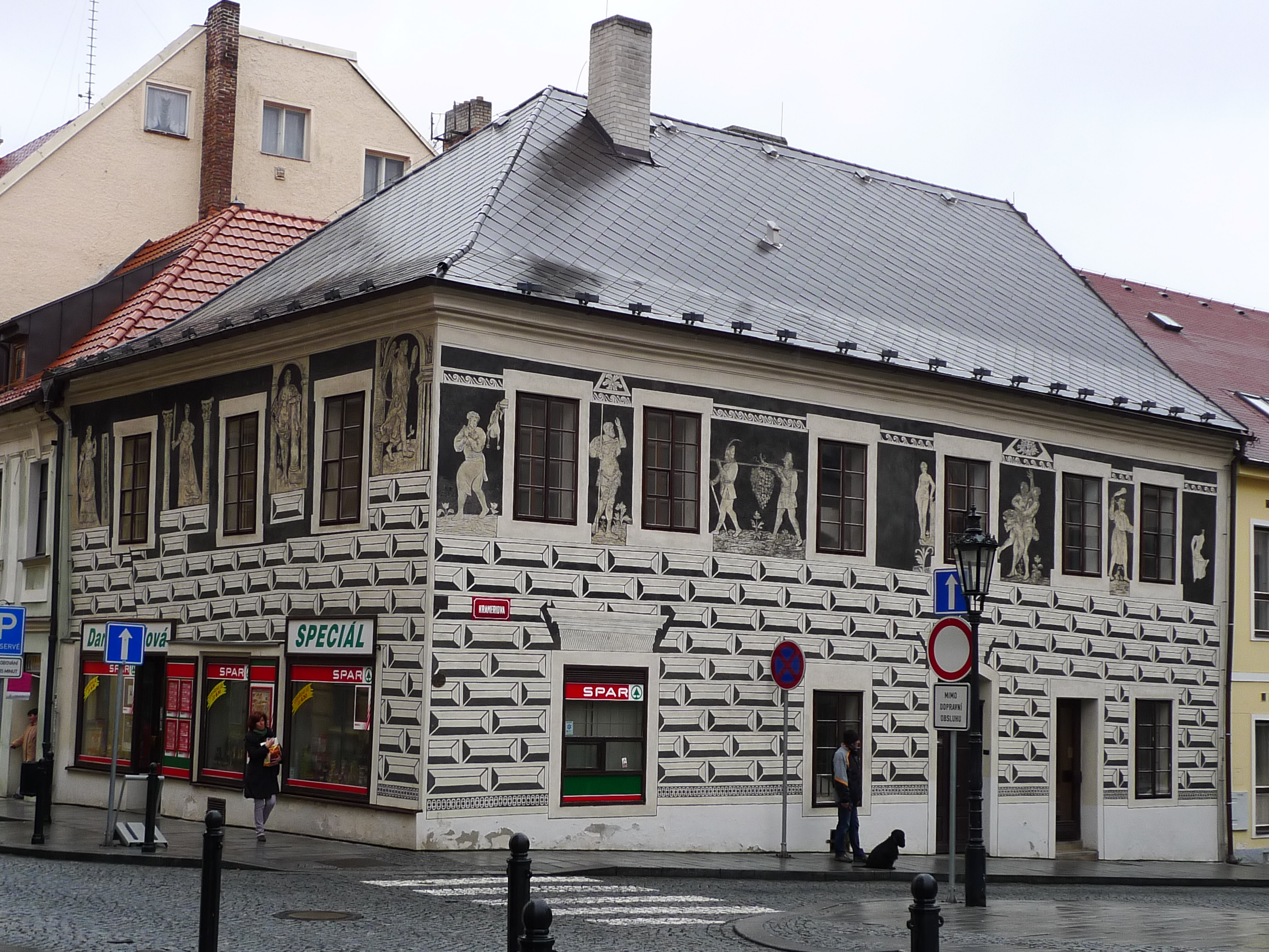 Městský dům (Klatovy), Krameriova 70, Klatovy